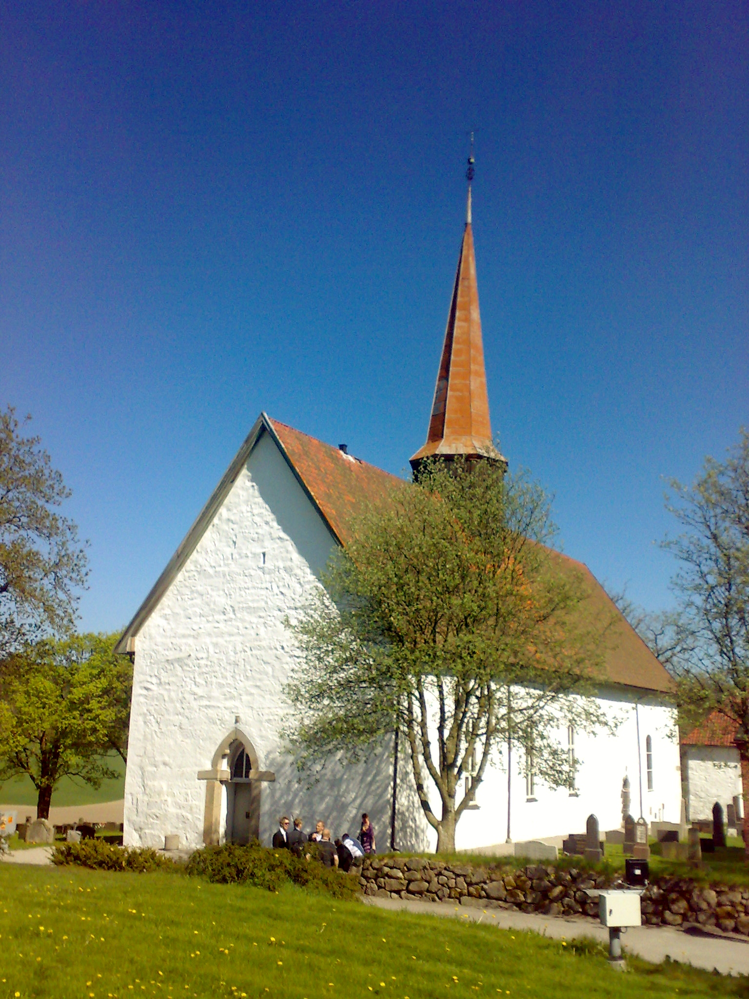 Skjeberg church, Østfold county (Norway), from the middle ages.